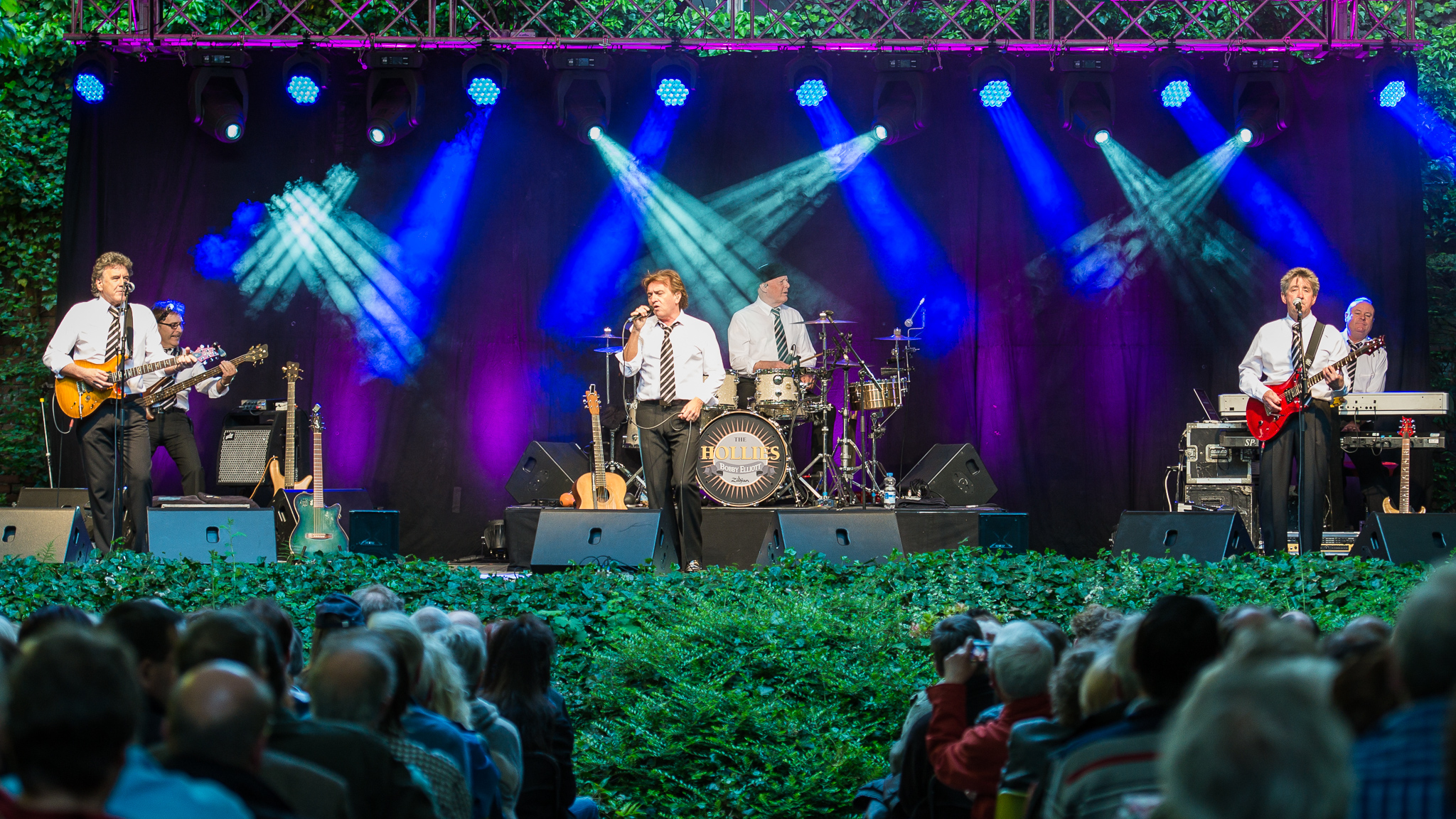 Bobby Elliott,Concertbüro Franken,Ian Parker,Konzert,Livekonzert,Livemusik,Musik,Peter Howarth,Ray Stiles,Serenadenhof,Steve Lauri,The Hollies,Tony Hicks